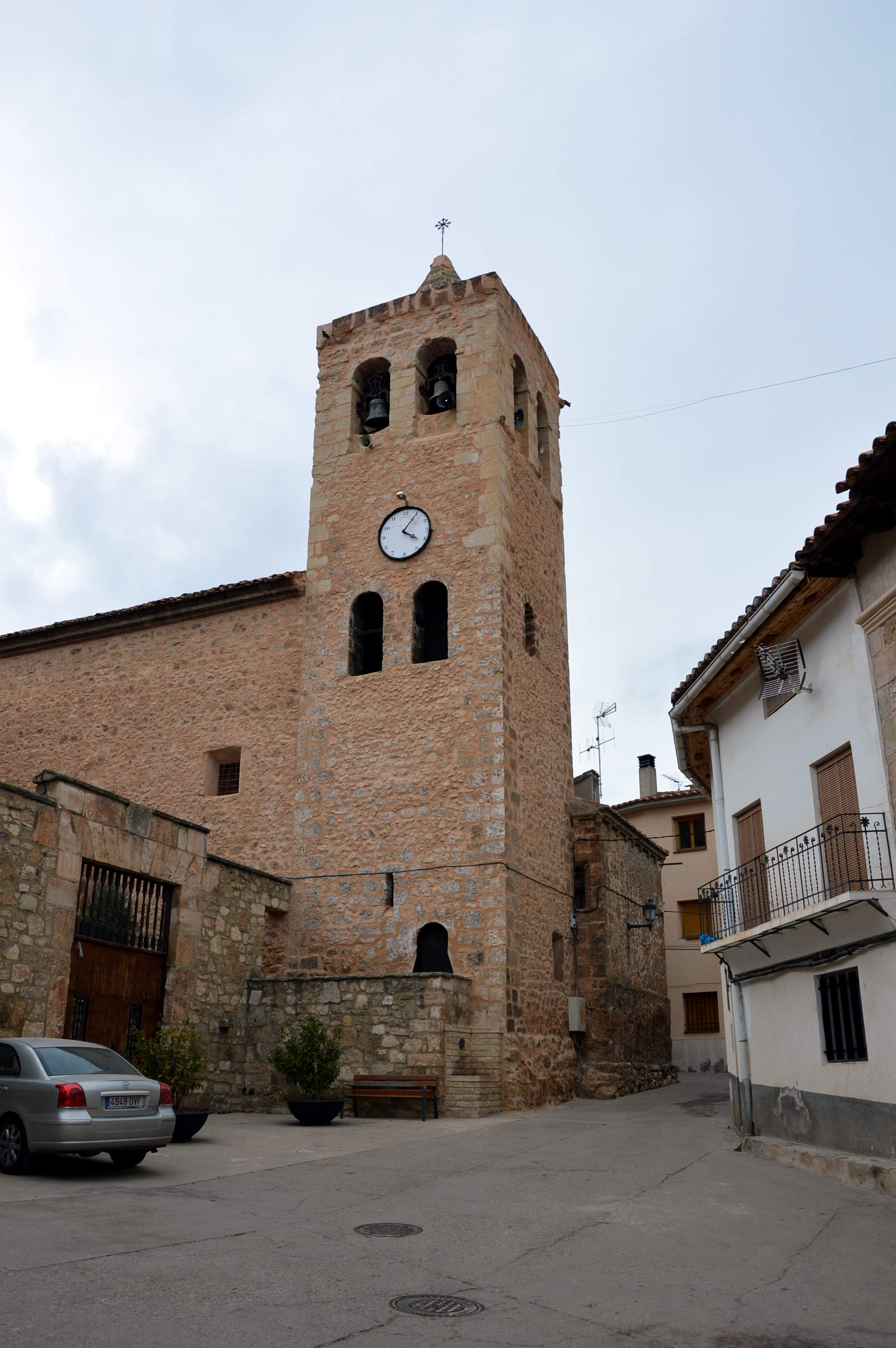 Vista parcial de la parroquial de El Cuervo (Teruel), con detalle del campanario, tras la restauración.